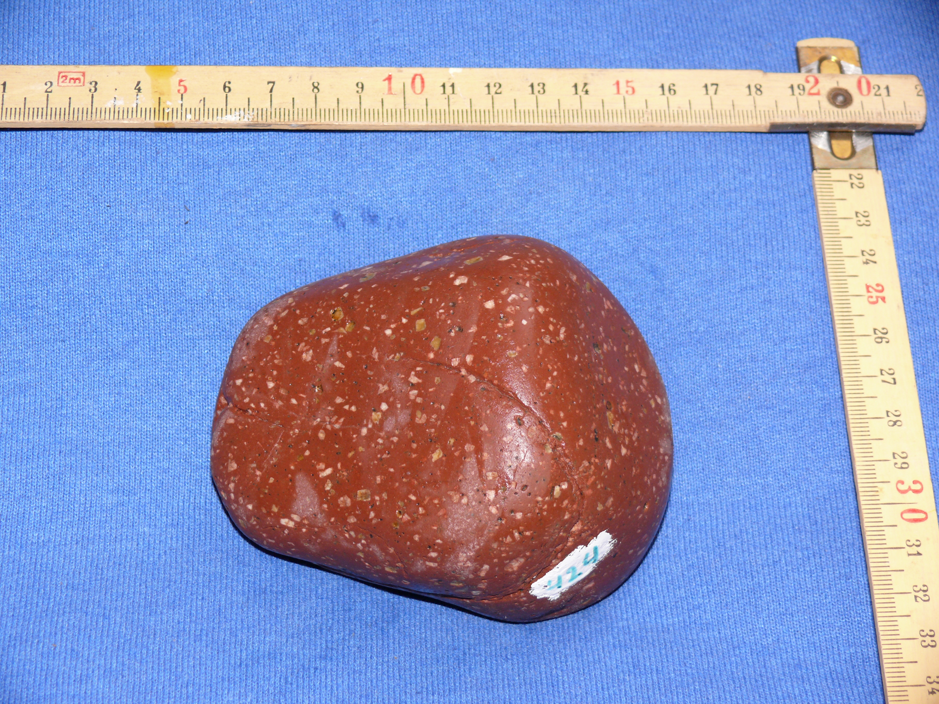 Särna Porphyr